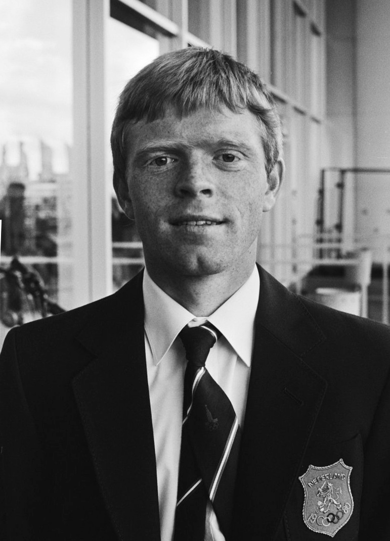 Peter Winnen avant le départ de l'équipe cycliste olympique néerlandaise pour les Jeux Olympiques d'été 1980 de Moscou.